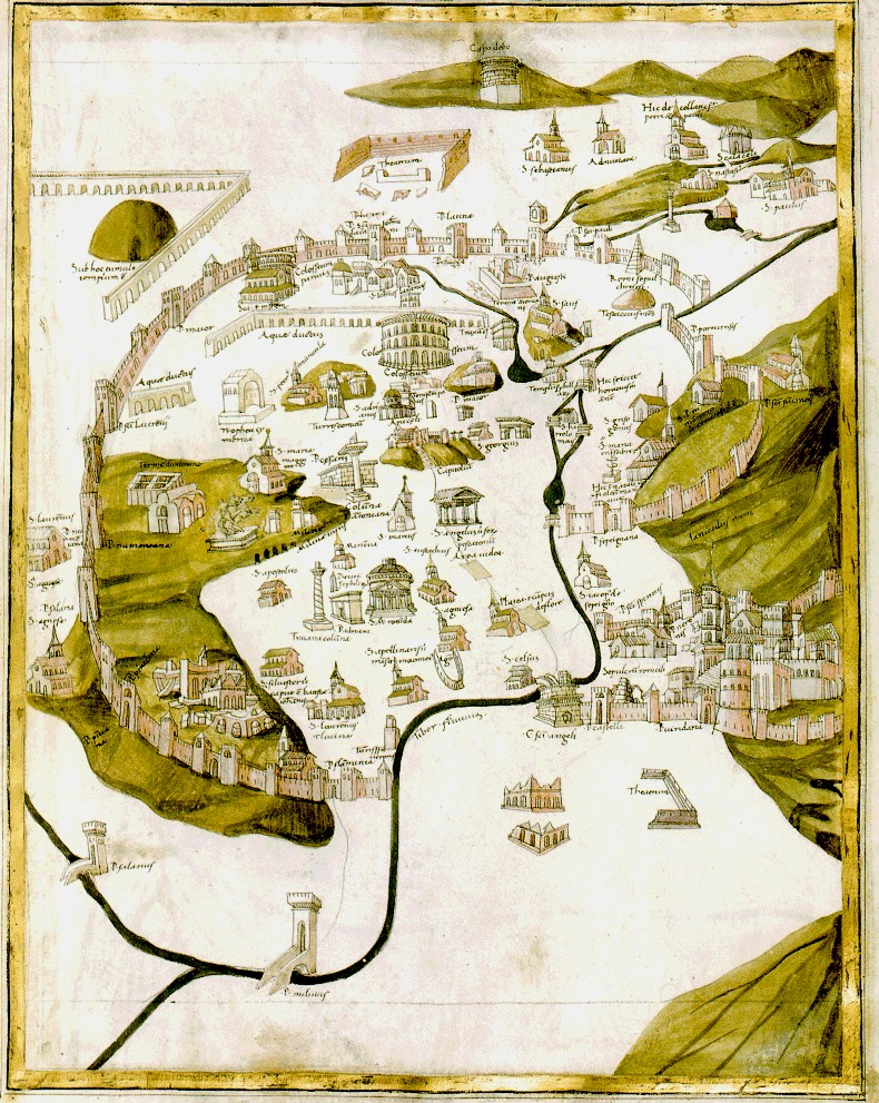 Mappa di Roma di Pietro del Massaio